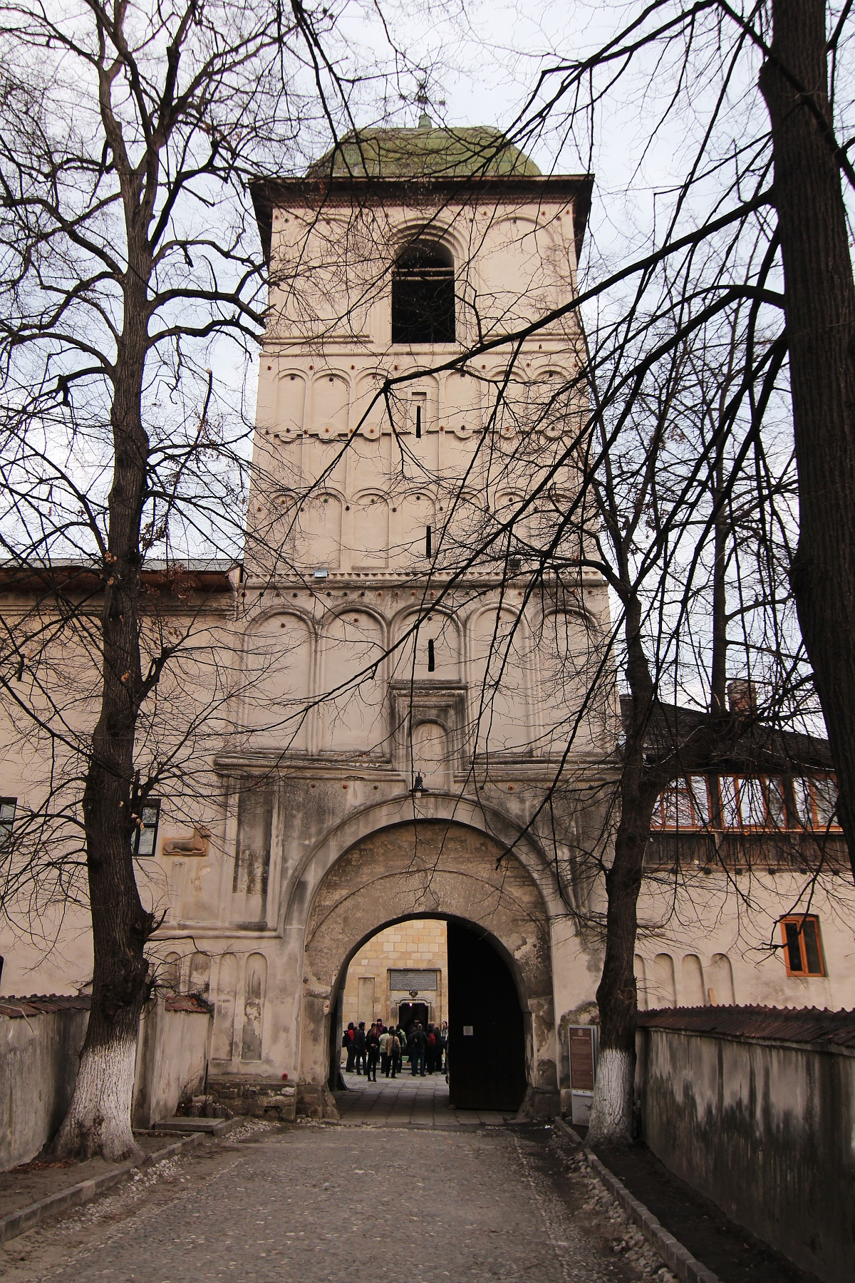 Turn clopotniță 05